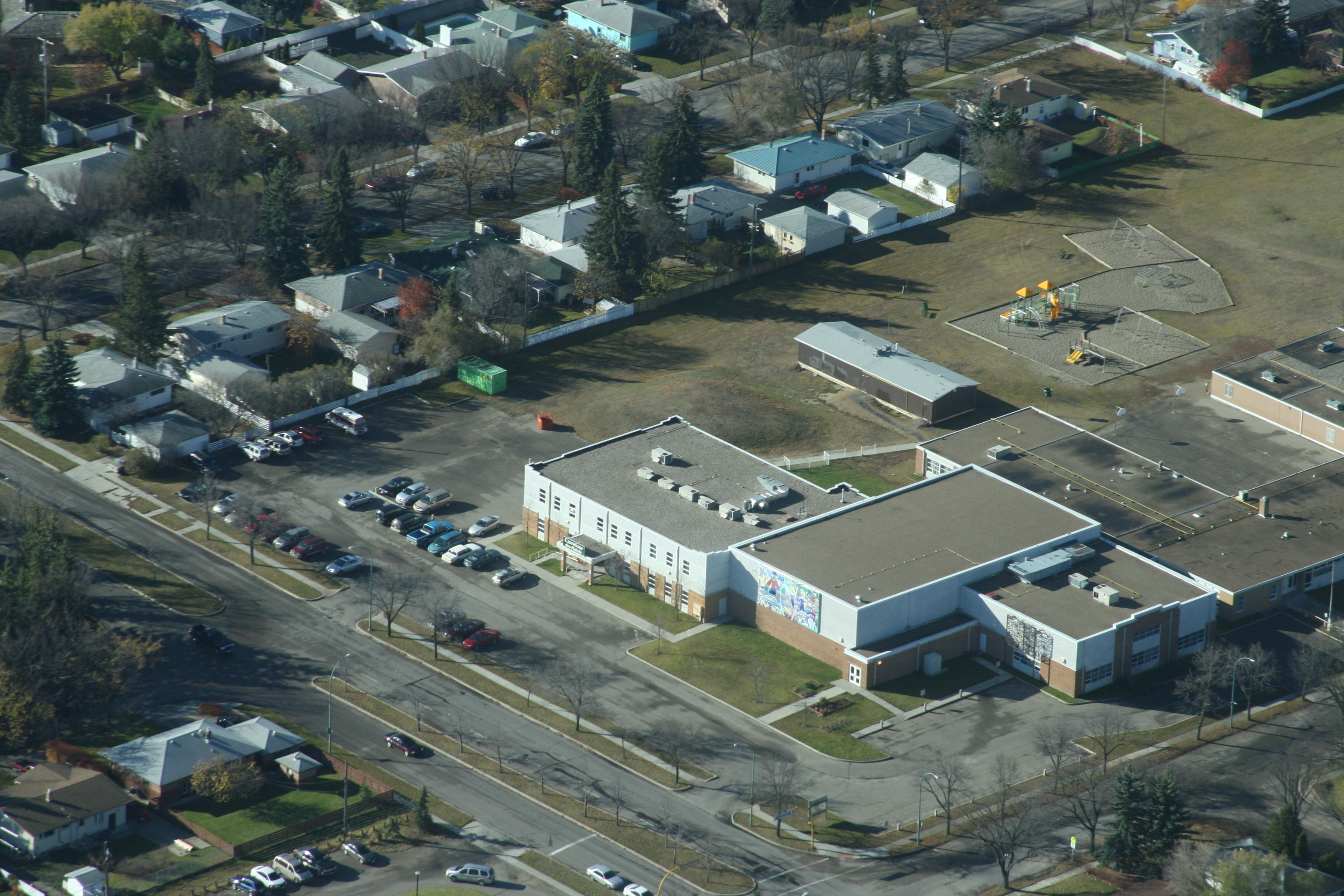 École Mgr de Laval / Carrefour des plaines